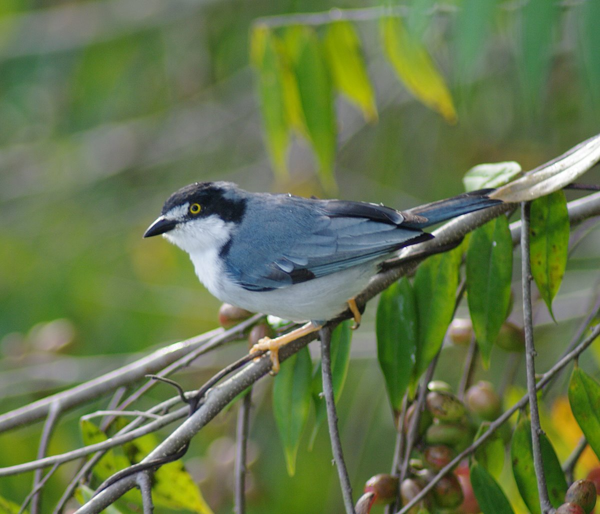 Saíra-de-Chapéu-Preto (Nemosia pileata) (Obrigado a Mozar pera identificação)